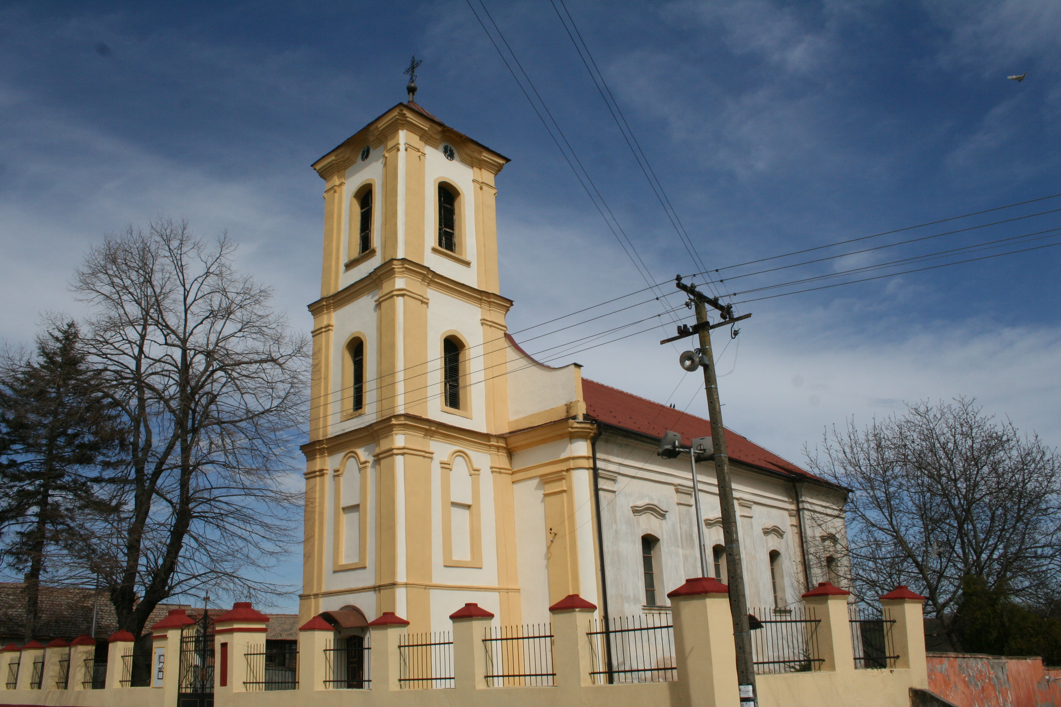 Crkva Svetog arhangela Gavrlia (Bešenovo)